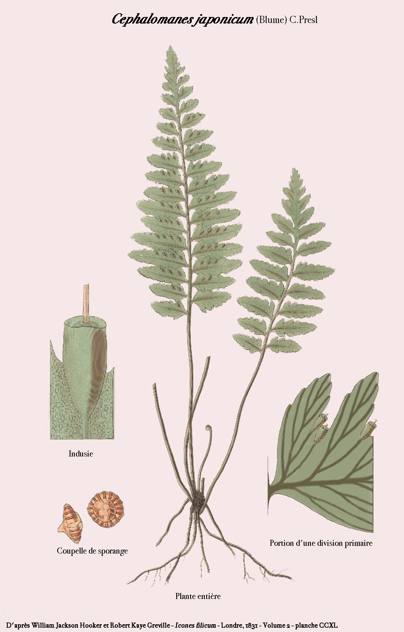 Cephalomanes javanicum (Blume) C.Presl - Schéma issu de Icones filicum de Hooker et Greville de 1836.